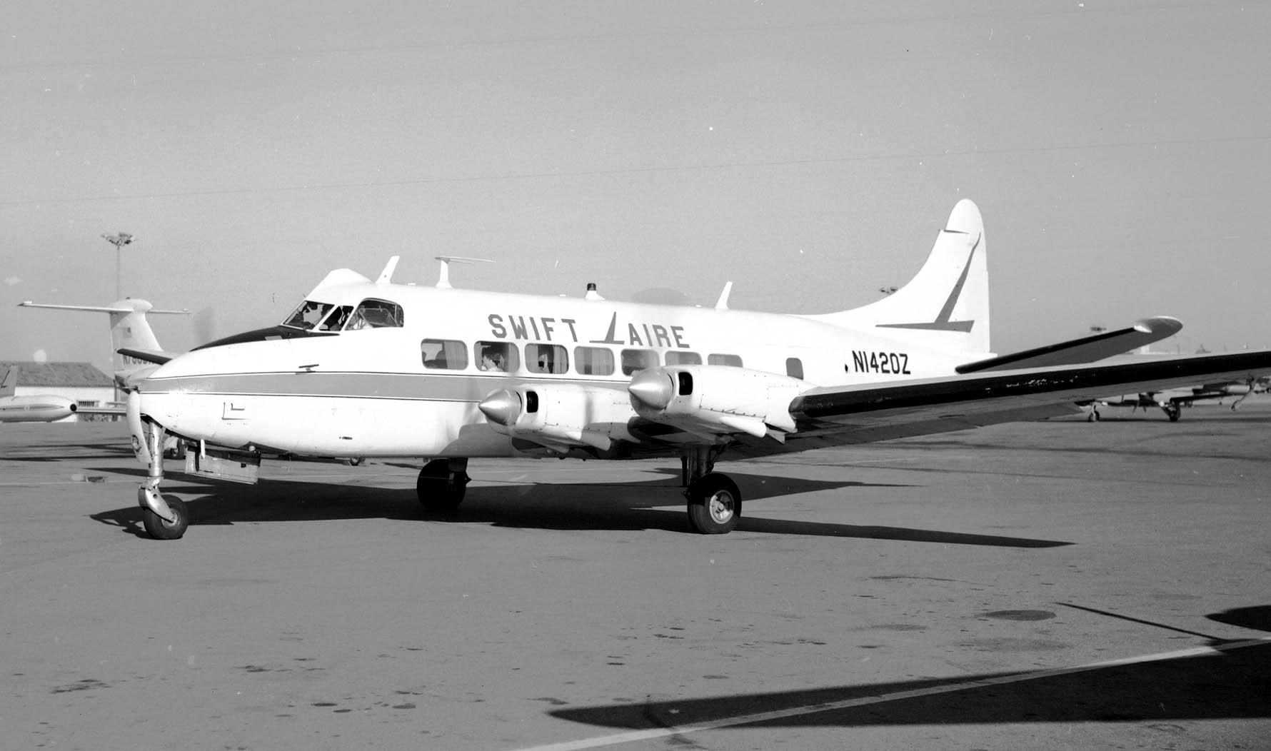 DeHavilland Heron